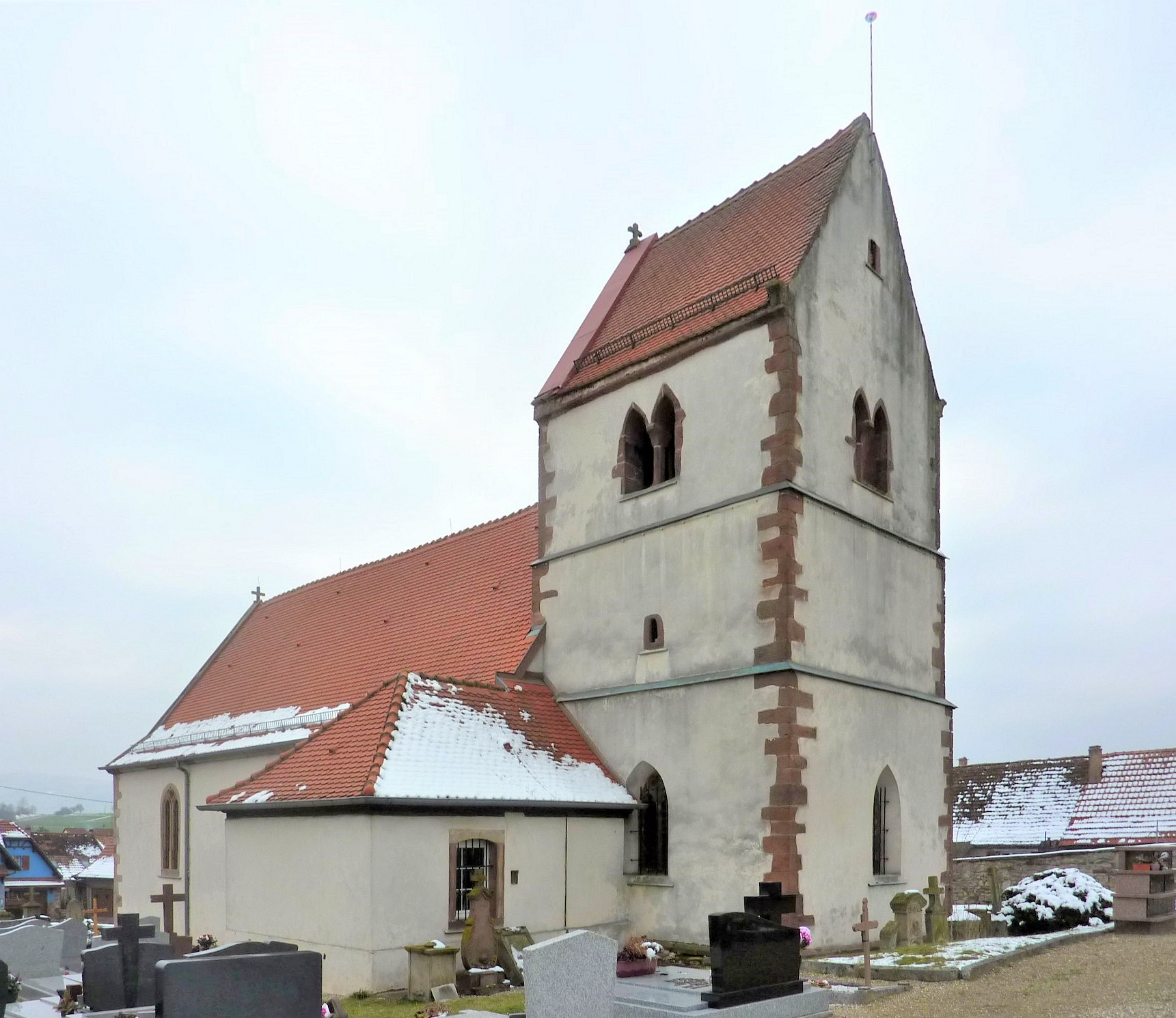 Église Saint-Remi de Singrist